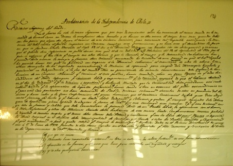 BEWJRWEJGEW--201.187.125.222 01:49, 31 May 2013 (UTC)DQWGJHWEJHHW Fotografía de la Proclamación de la Independencia de Chile manuscrita, exhibida en el Congreso Nacional de Chile, Valparaíso.